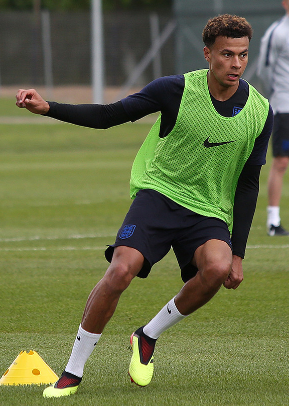 Каравай, самовар и сборная Англии. Кейн и компания готовятся к ЧМ-2018